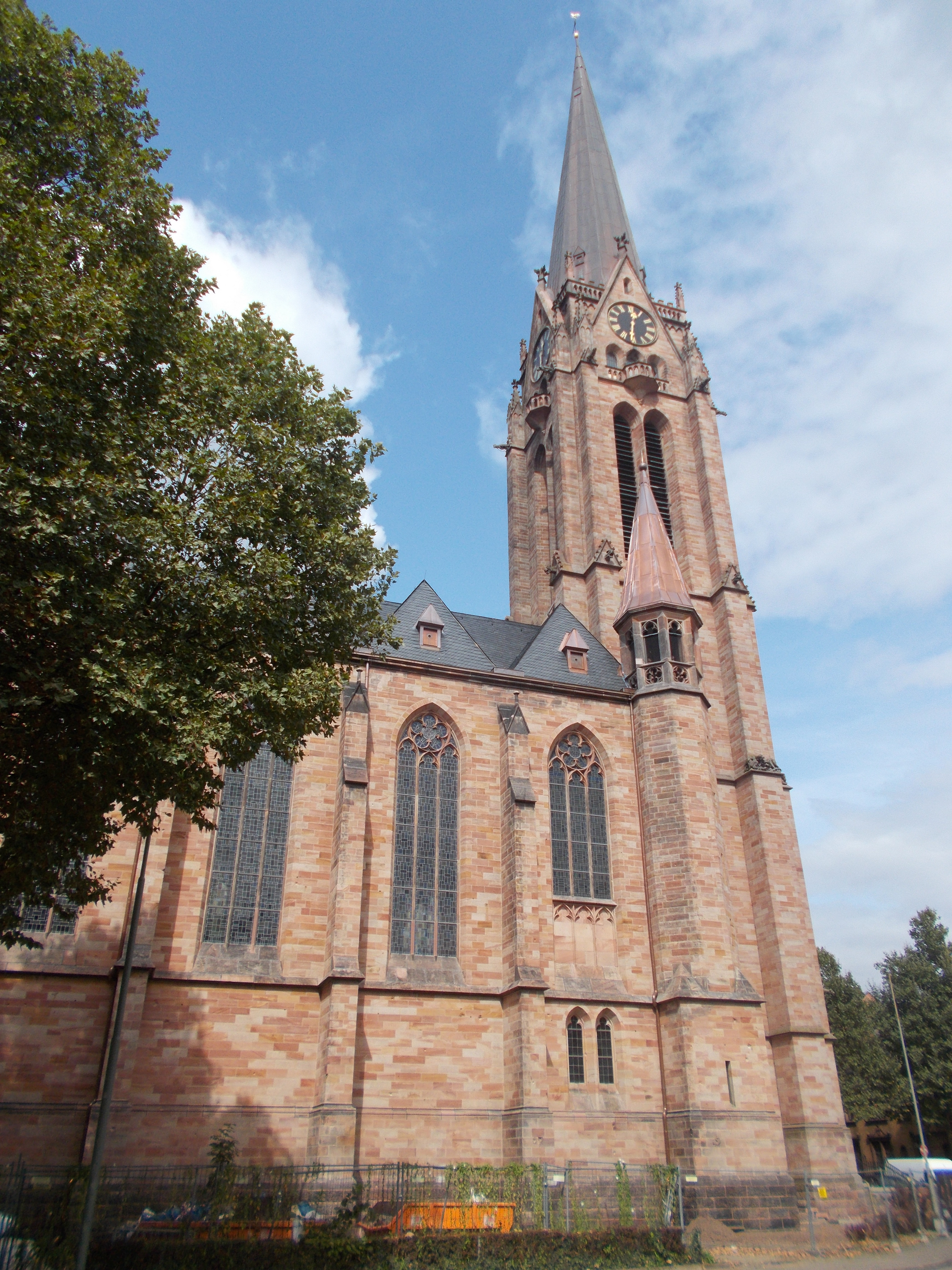 monumentaler neugotischer Sandsteinquaderbau, dreischiffige Halle, Seitenschiffe mit Querwalmdächern, 1887–92, Architekt Heinrich von Schmidt, München, Marienskulptur im Wimperg, von I. Stolz, München, Hochreliefs durch die Firma Erfurt & Wüst, Stuttgart, Glasfenster von Wilhelm Pürz, 1951–56; mit Ausstattung